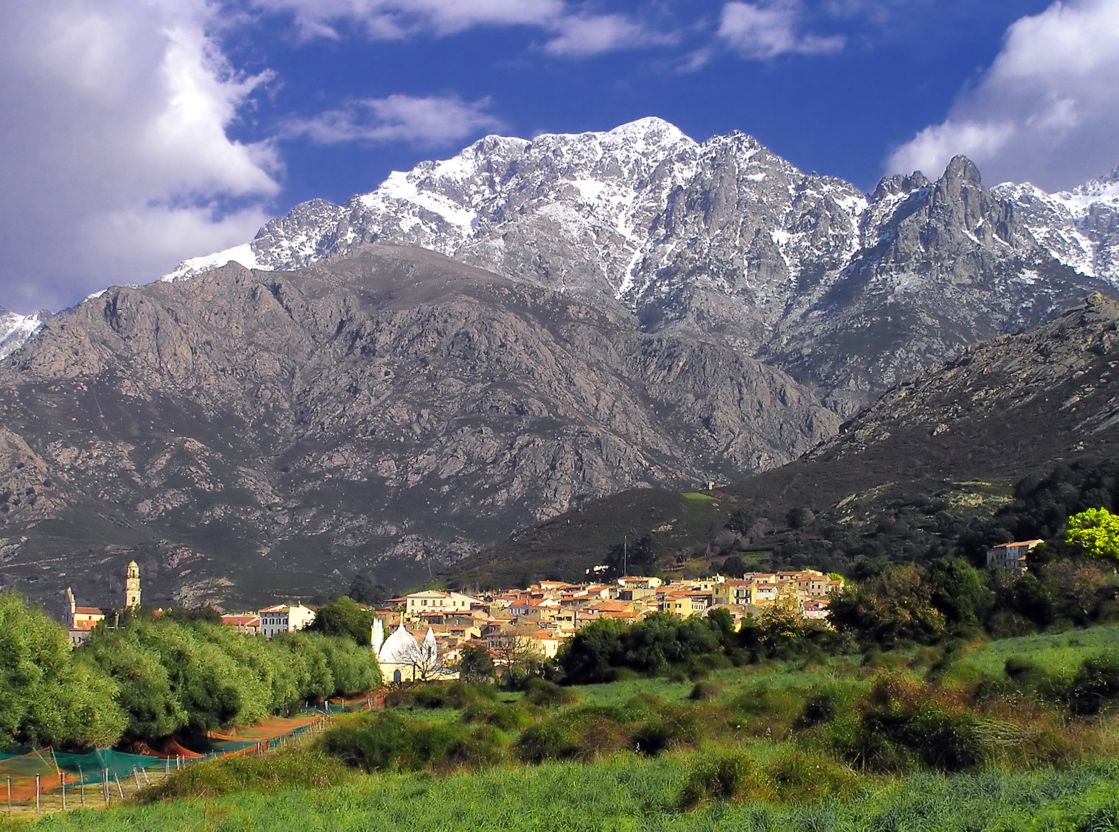 Le village de CALENZANA en Haute-Corse.